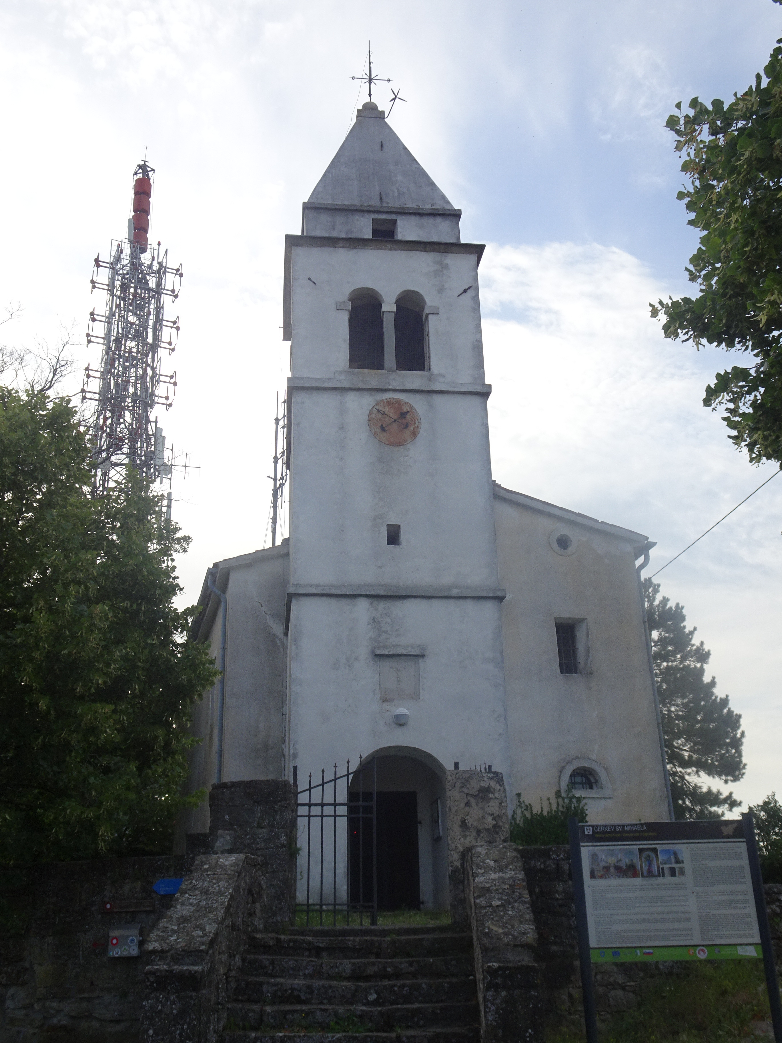 cerkev sv. Mihaela, Tinjan